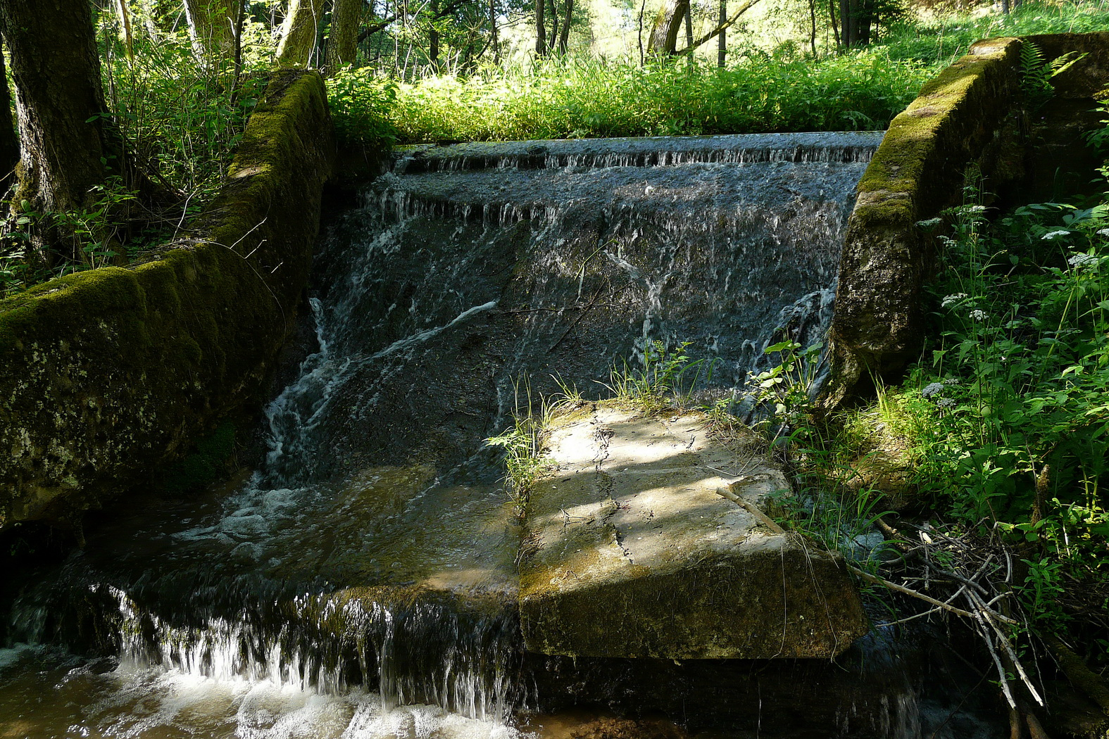 Rozpadlý splav na Malé Mohelce